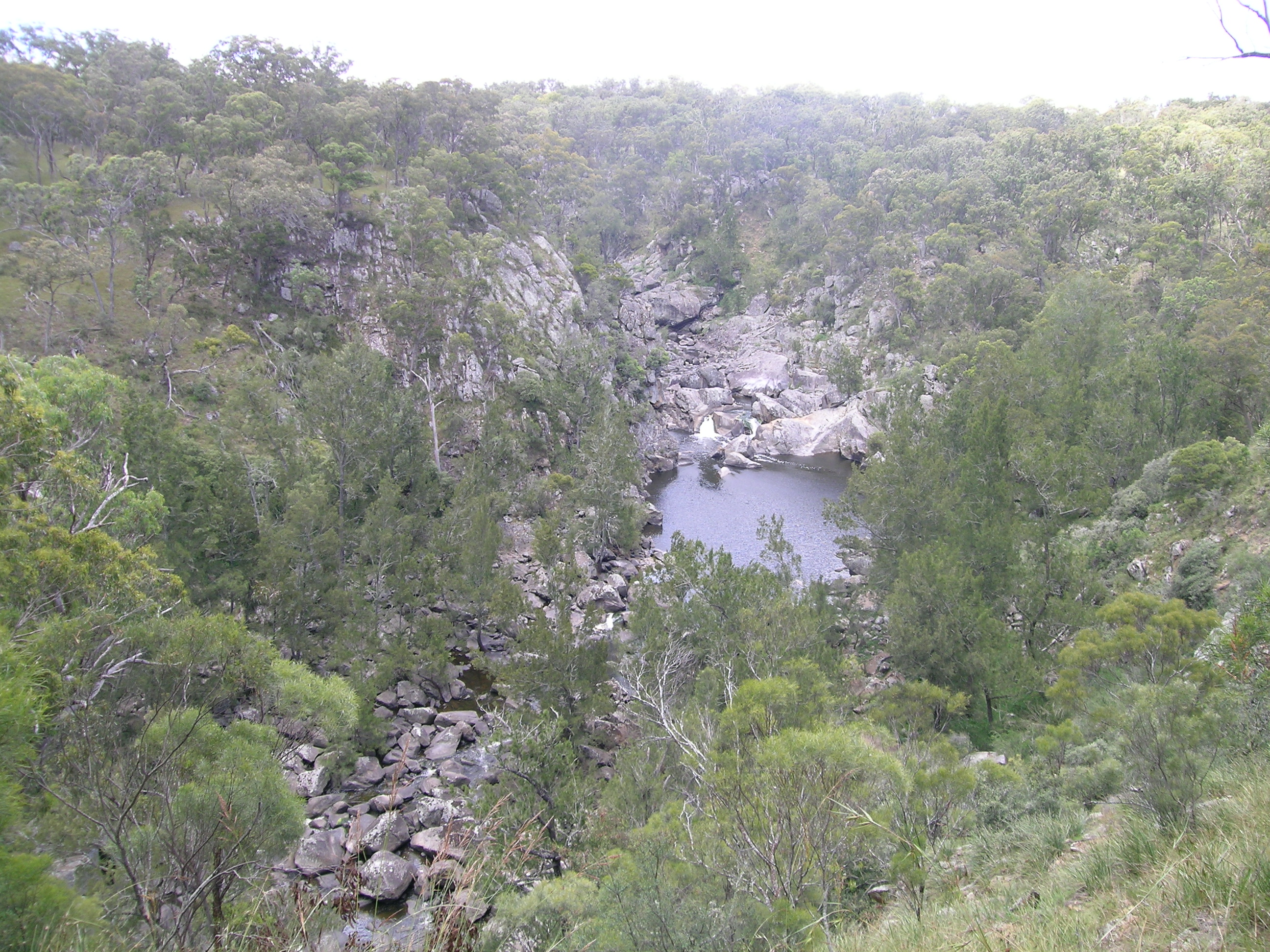 Gara Gorge, Armidale, NSW